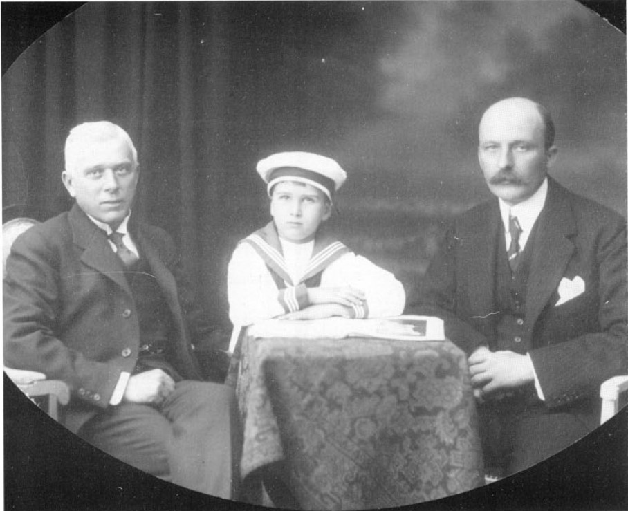 El empresario chileno de origen croata Pascual Baburizza con el que fuera su socio, Luis Mitrović, y el hijo de este, futuro arquitecto que proyectó el mausoleo donde descansan los restos de Baburizza